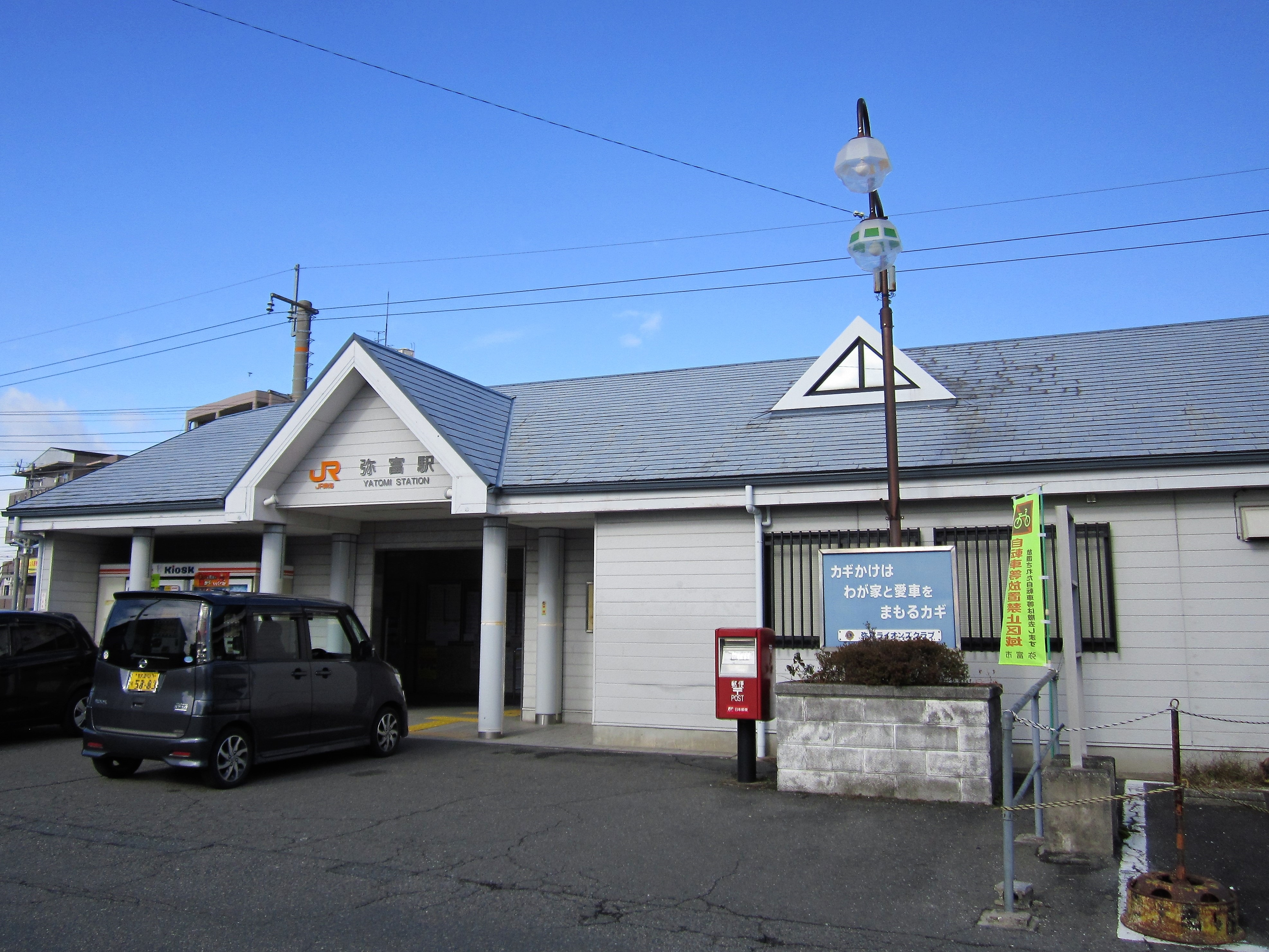 JR・名鉄の弥富駅 Canon PowerShot A2200